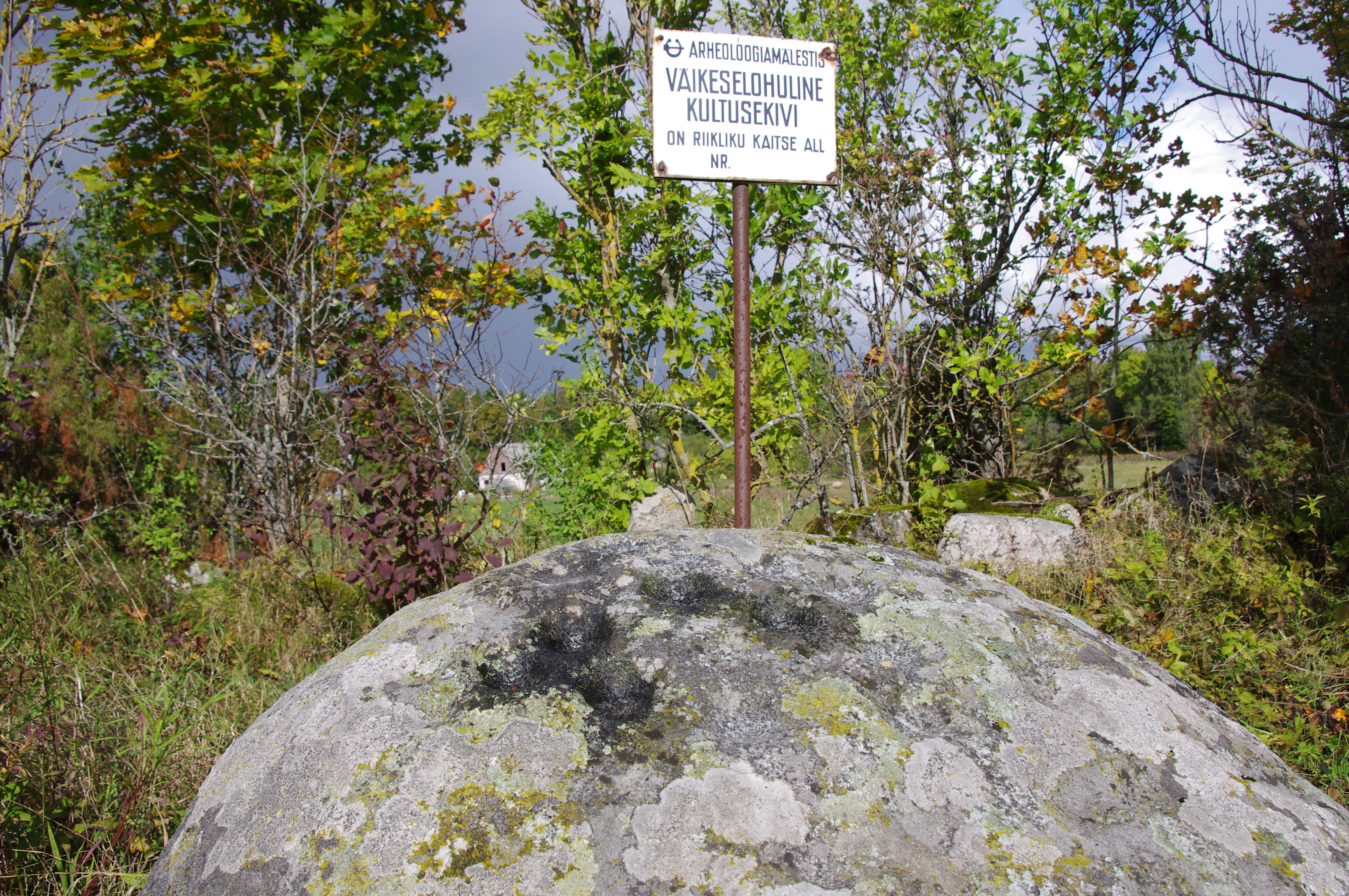 Kultusekivi